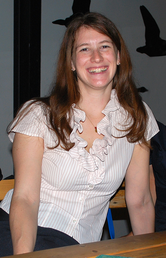 Nataša Krambergerová na festivalu Měsíc autorského čtení v Brně, červenec 2012